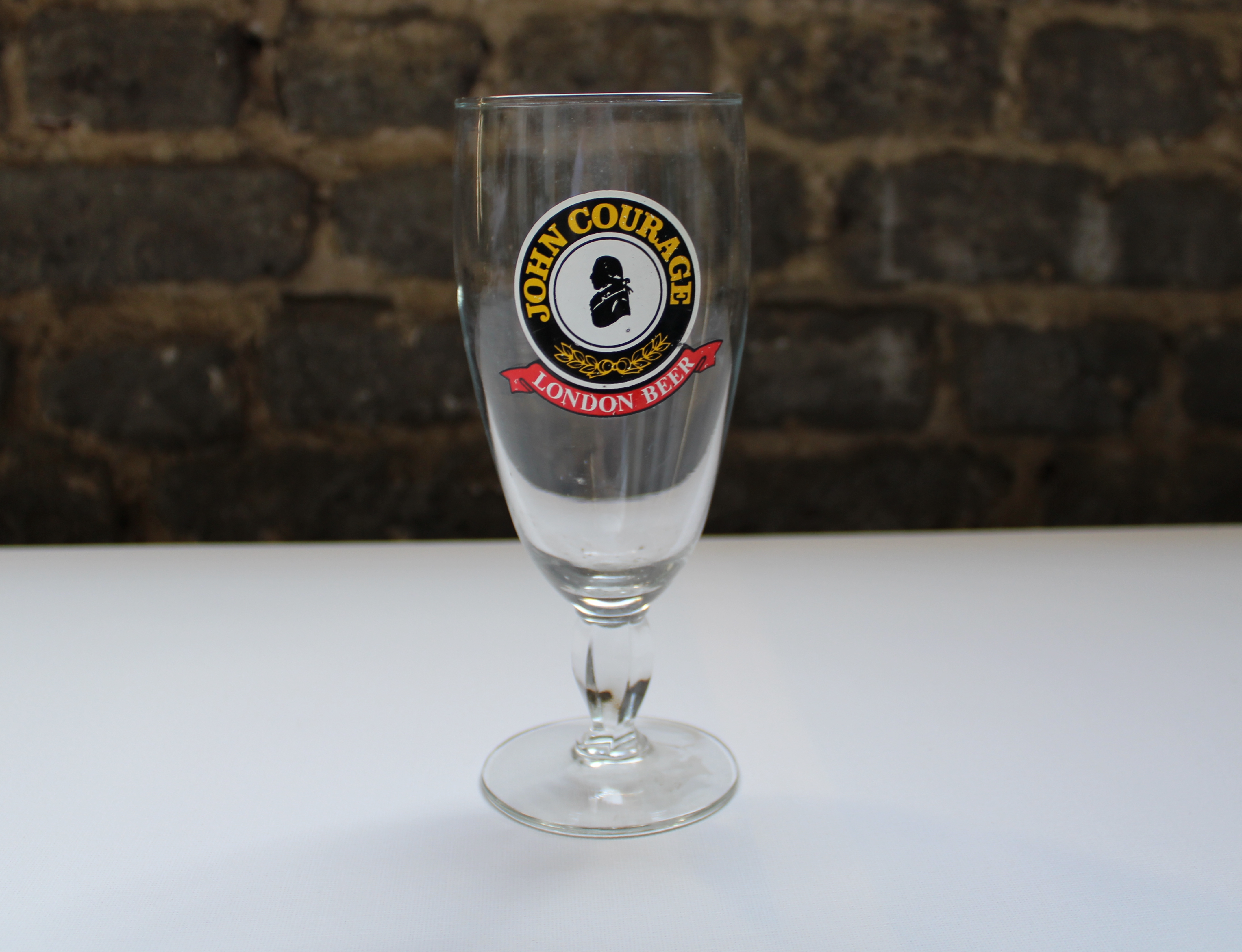 Verre à bière John Courage London Beer